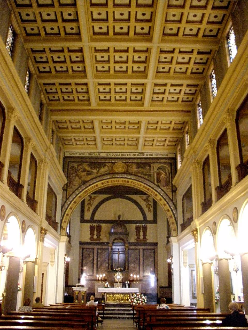 Oviedo - Iglesia de las Esclavas